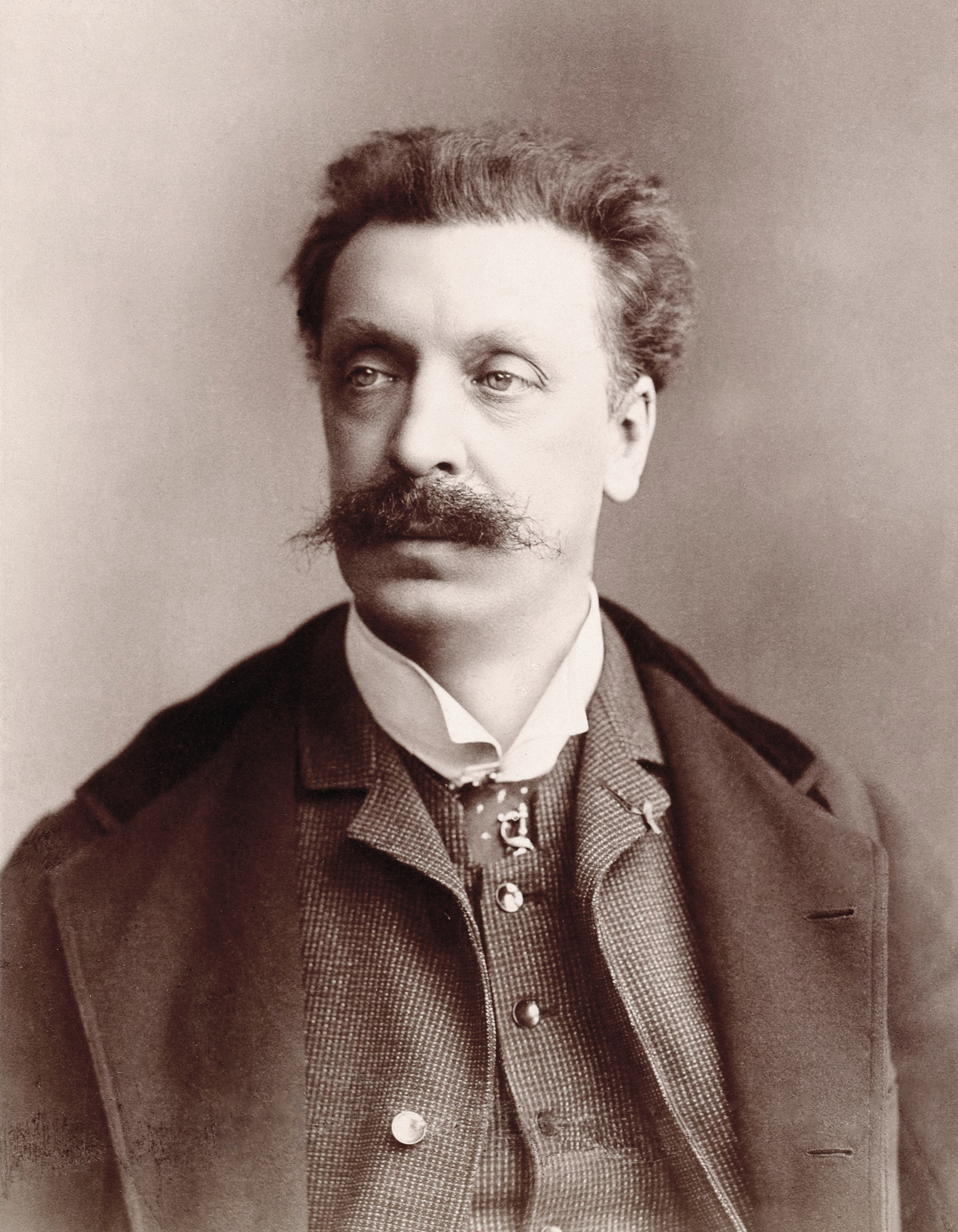 Victorin de Joncières (1839 - 1903), compositeur et critique musical français.